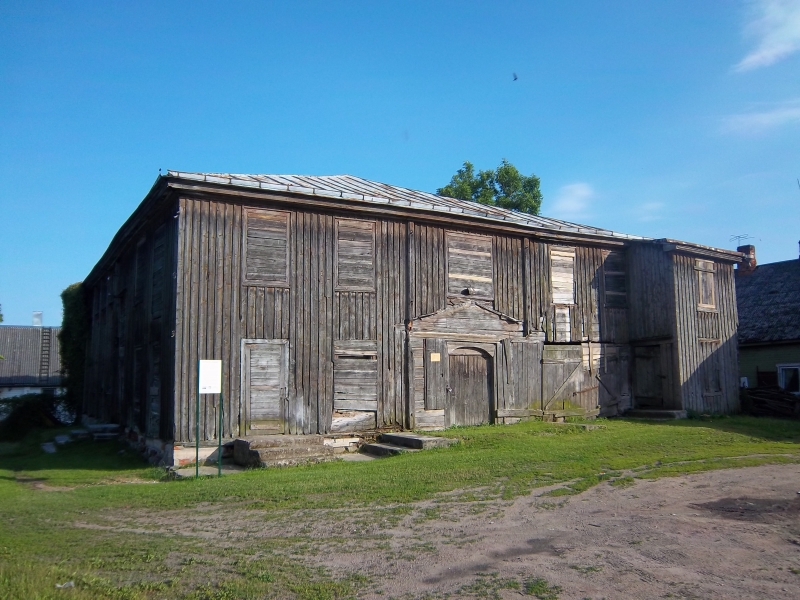 Žiežmarių medinė sinagoga